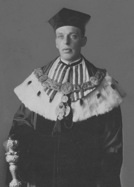 Biskup Czesław Falkowski, profesor historii Uniwersytetu Wileńskiego. Fotografia w uroczystym stroju akademickim z insygniami władzy.